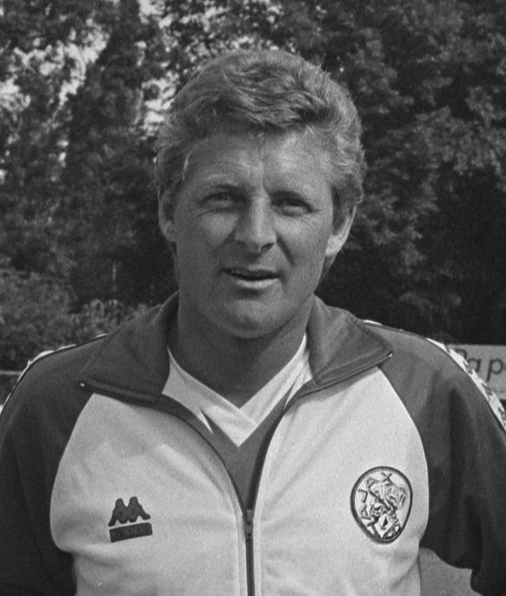 Persdag Ajax; v.l.n.r. Cor van de Hart, Tonny Bruins Slot, Johan Cruyff en Antoine Kohn.